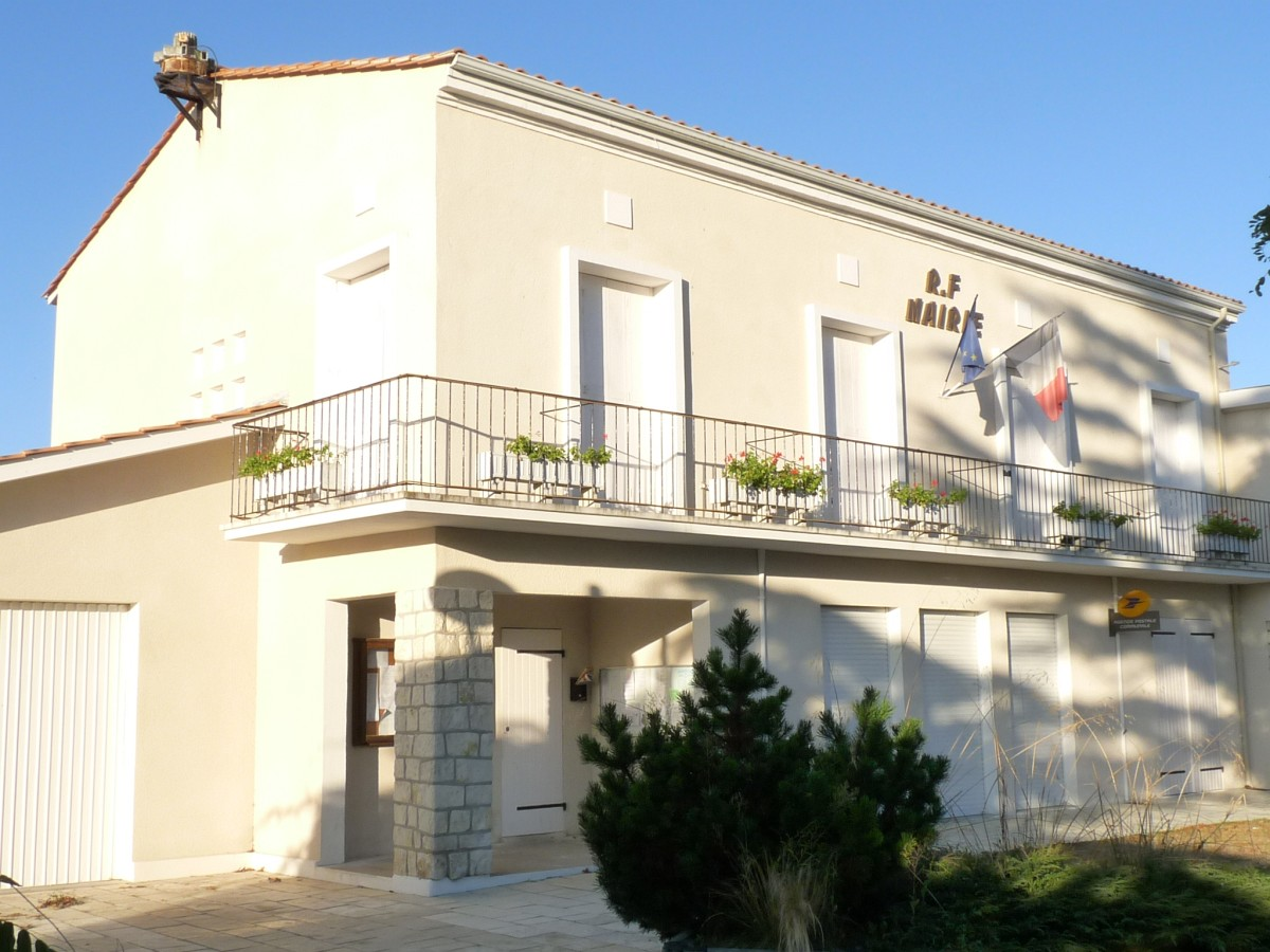 Mairie de Talais, Gironde, France